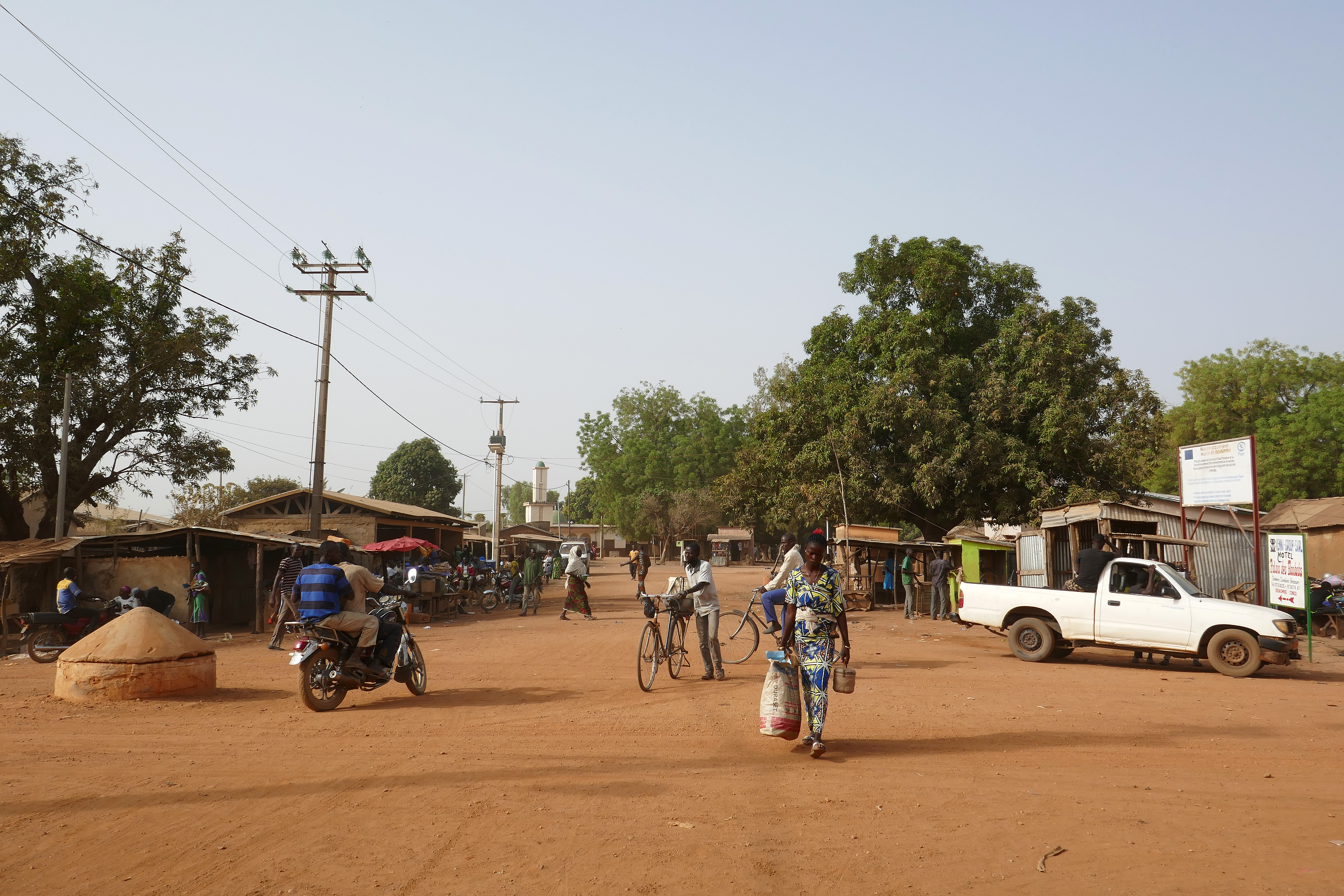 Une rue de Boukoumbé (Atacora, Bénin).